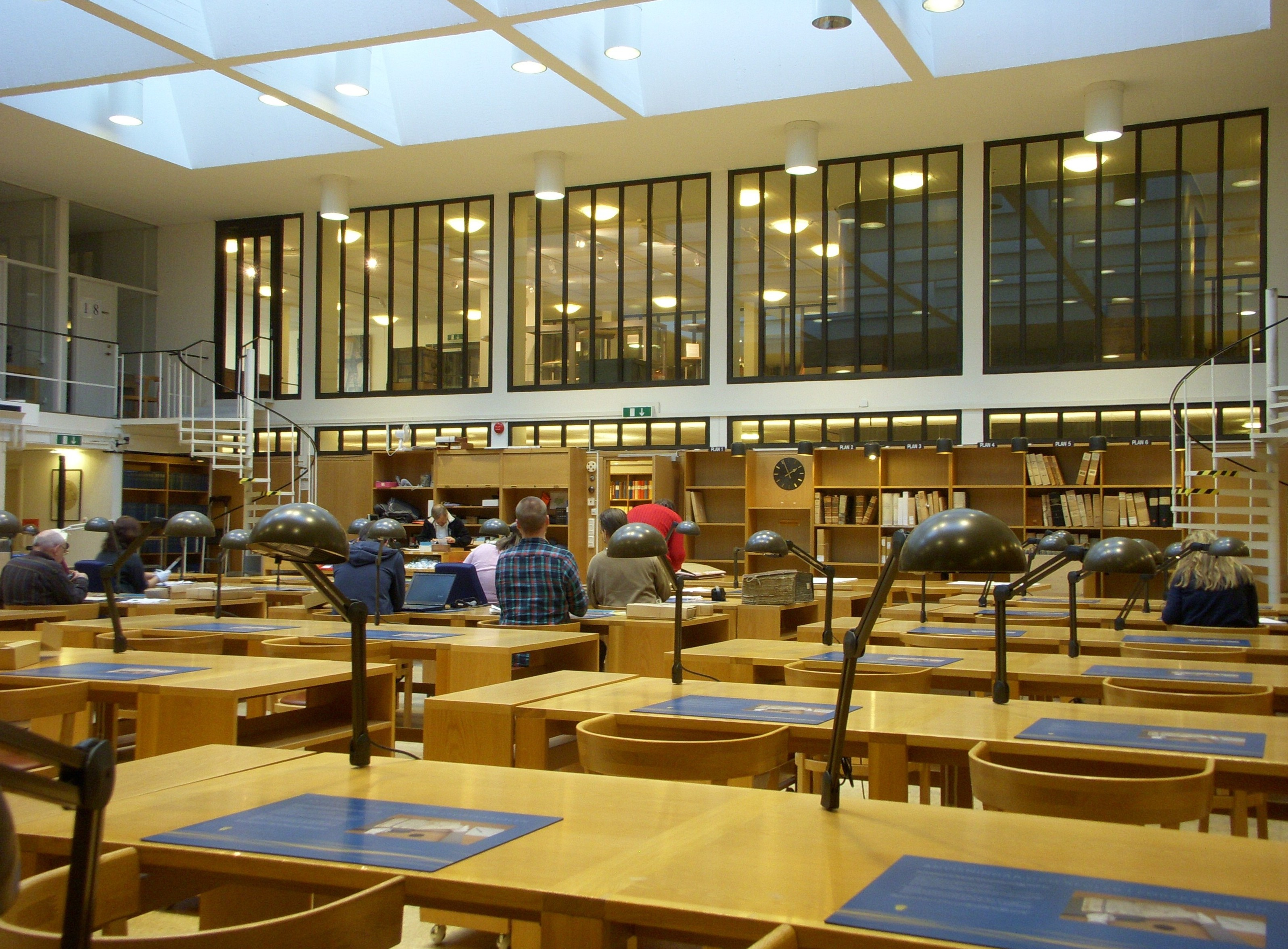 Riksarkivets huvudbyggnad på Kungsholmen, Stockholm, forskarsalen med Per Sundstedts skrivborslampa "Rikta"